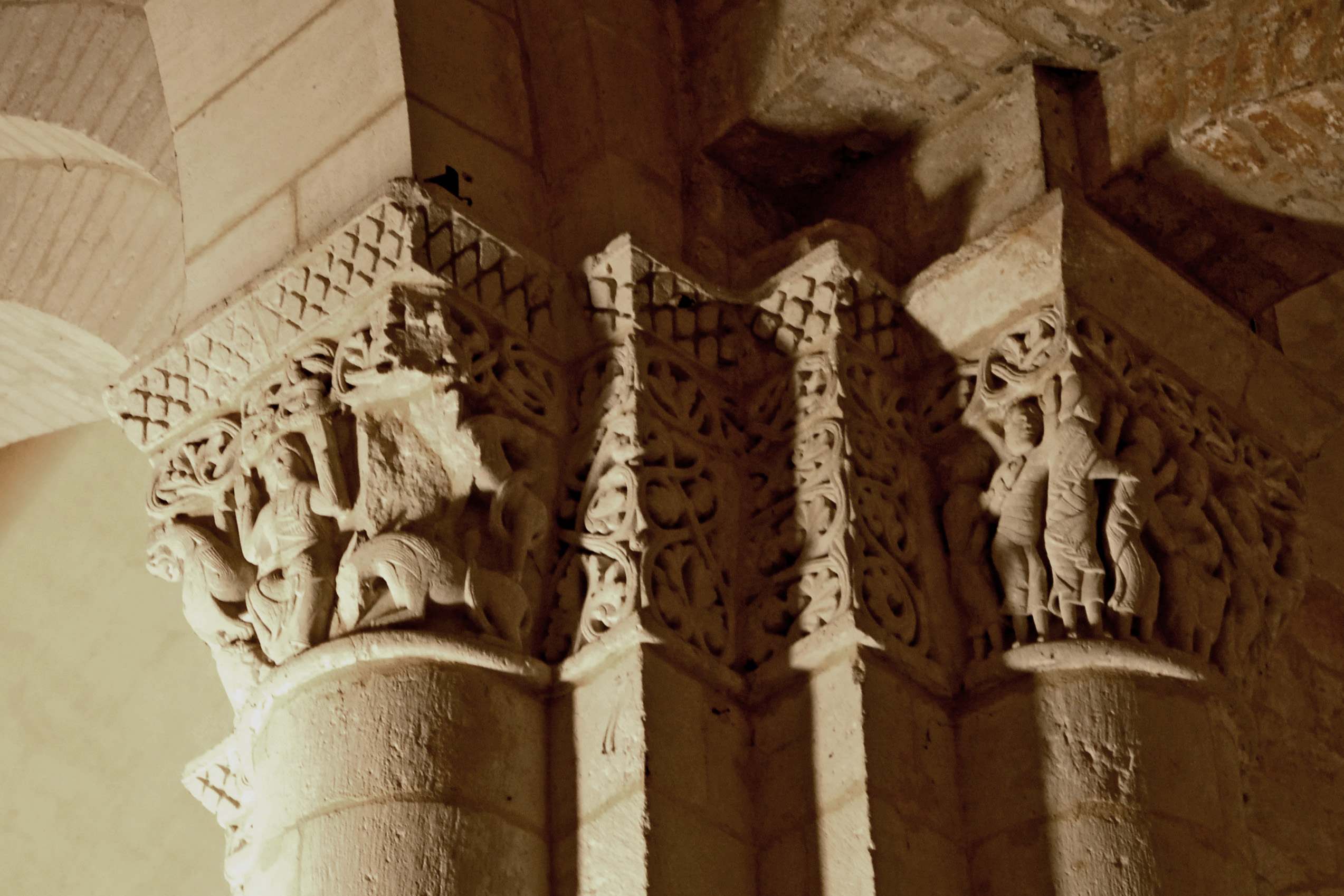 St.-Eutrope, Saintes, Oberkirche,Kapitellbündel Vierung, rechts König von Babylon